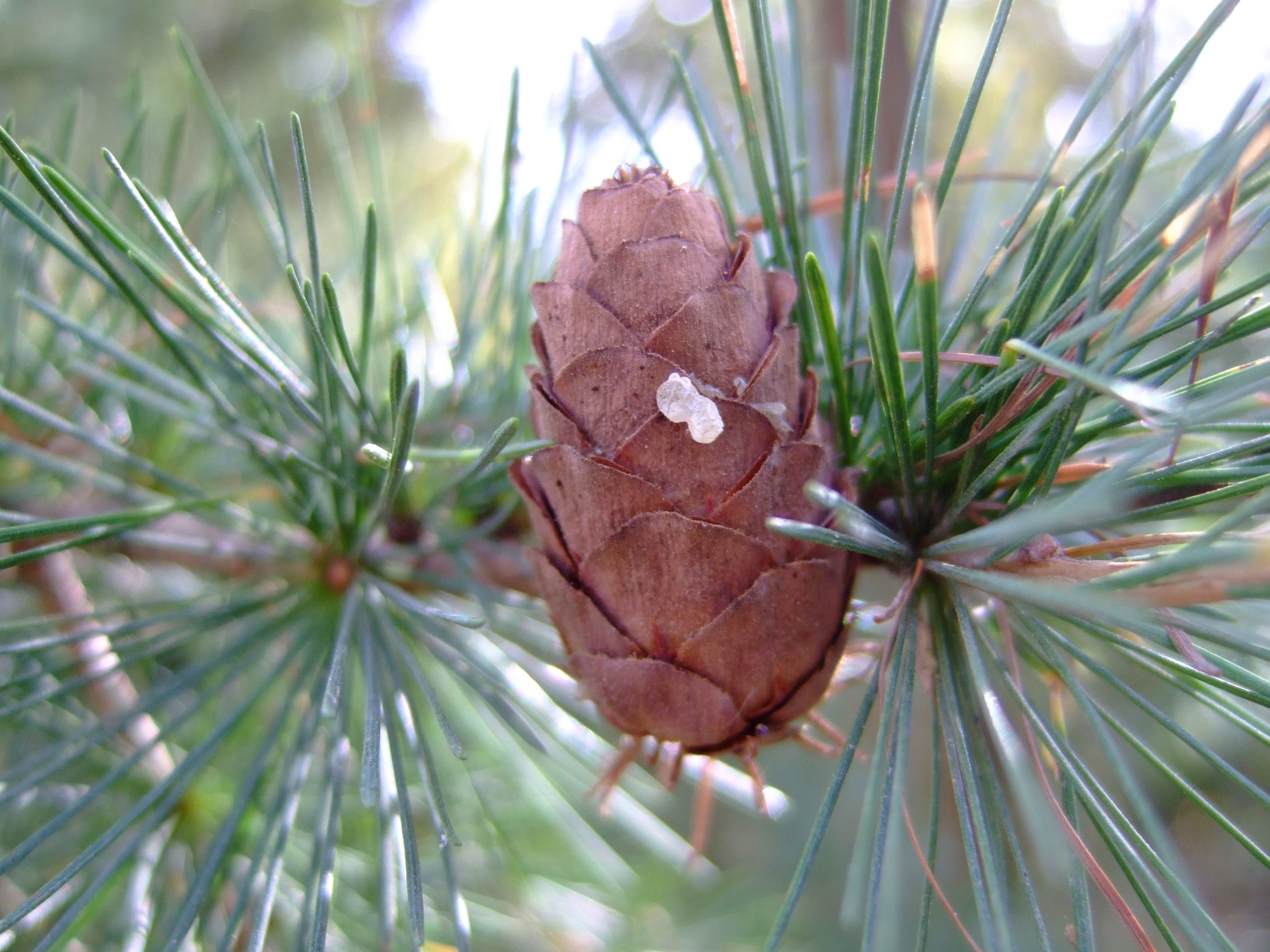 Larix decidua cone and leaves, Wiesbaden, Germany